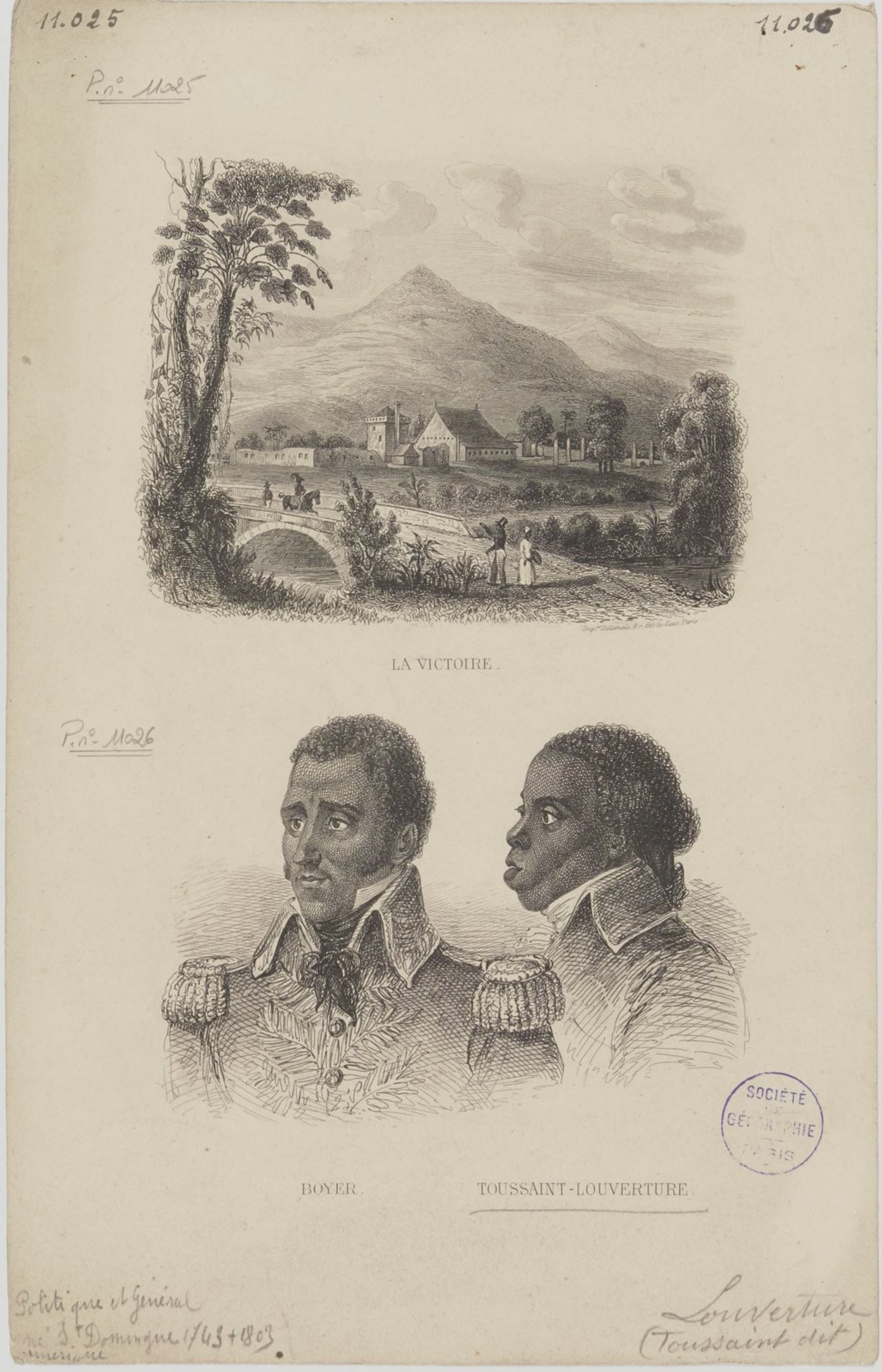 La Victoire, 1800-1899. Avec un paysage et deux portraits : Jean-Pierre Boyer, François-Dominique Toussaint Louverture, à l'origine Toussaint de Breda.